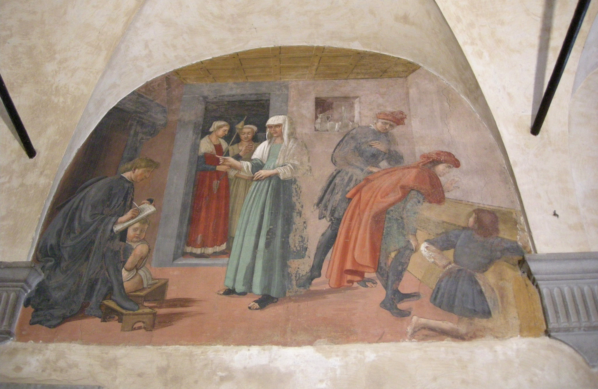 Oratorio dei buonomini di s. martino, lunette di Francesco d'Antonio, notaio fa un inventario